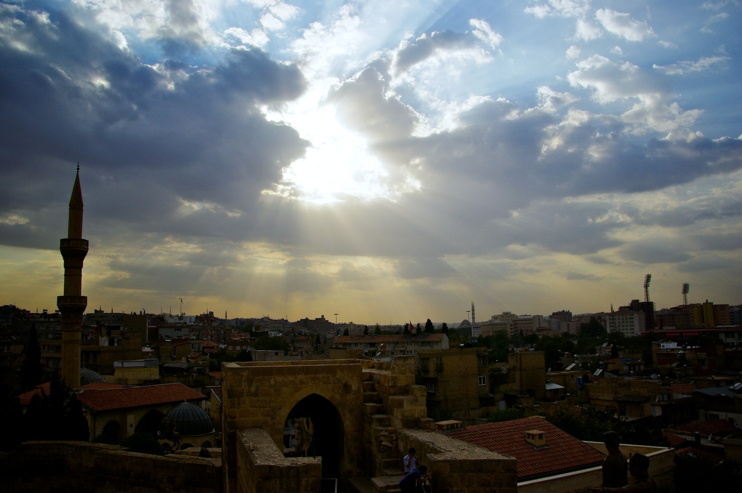 Gaziantep, Turkey